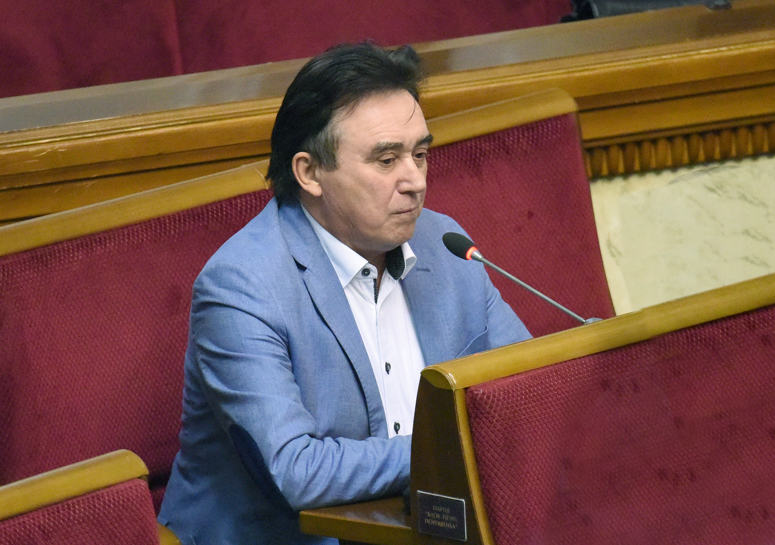 Верховная Рада Украины, 2018